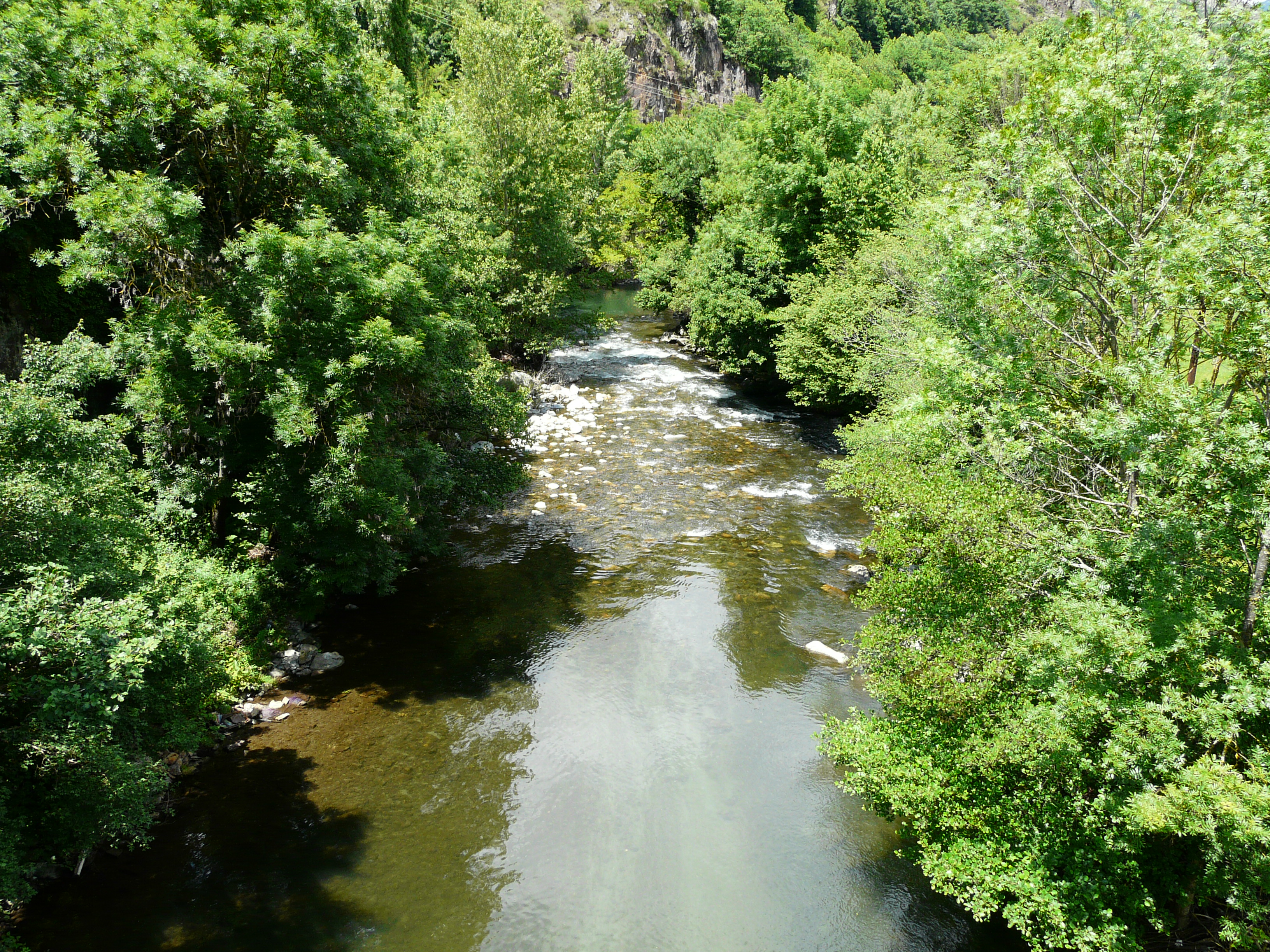 En aval du pont de Pontaut, la Garonne marque la limite entre Bausen (à gauche) et Canejan (à droite), Val d'Aran, Espagne.